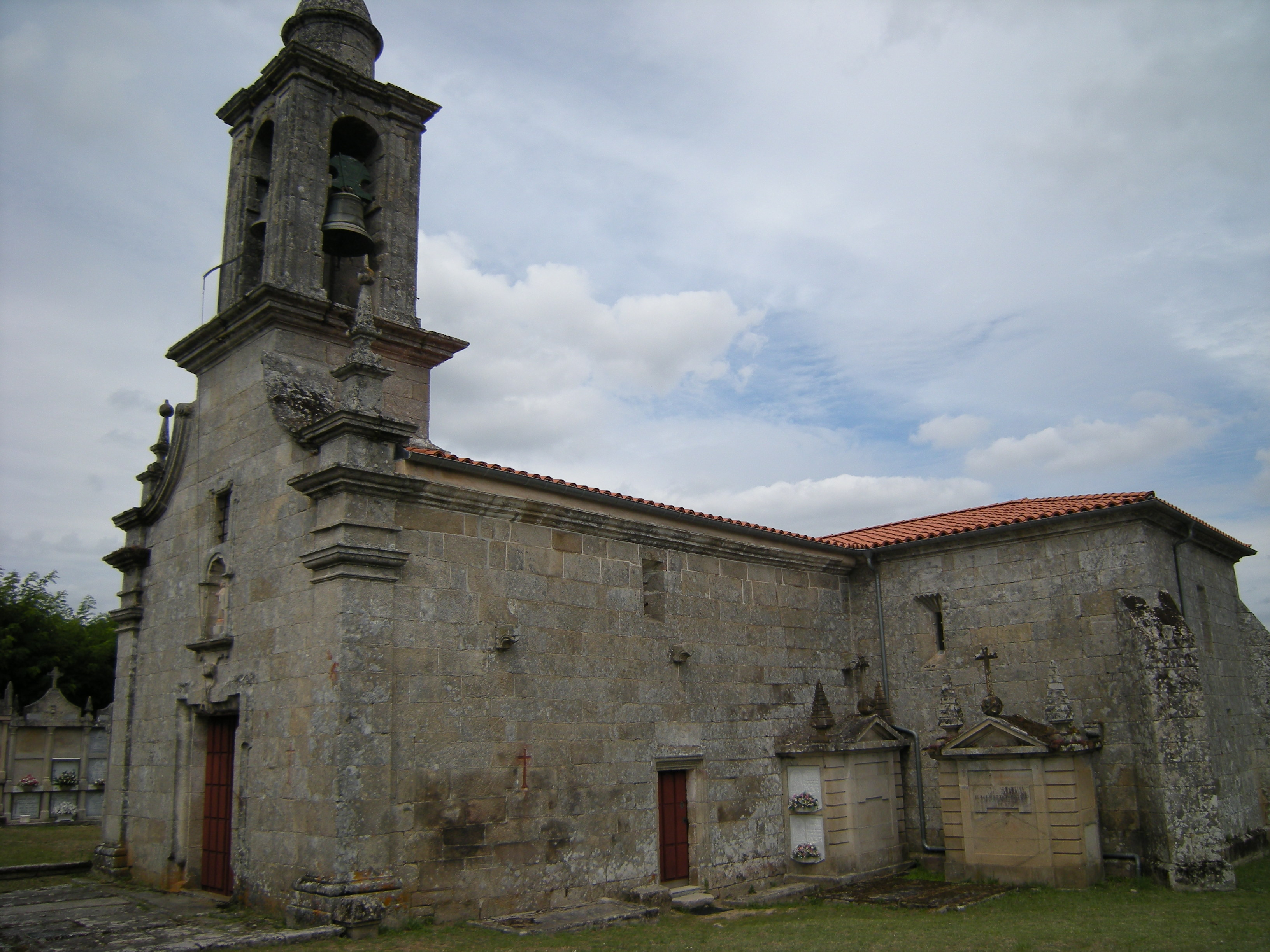 Iglesia de estilo barroco en la que se aprovecharon algunas piezas del anterior templo románico.